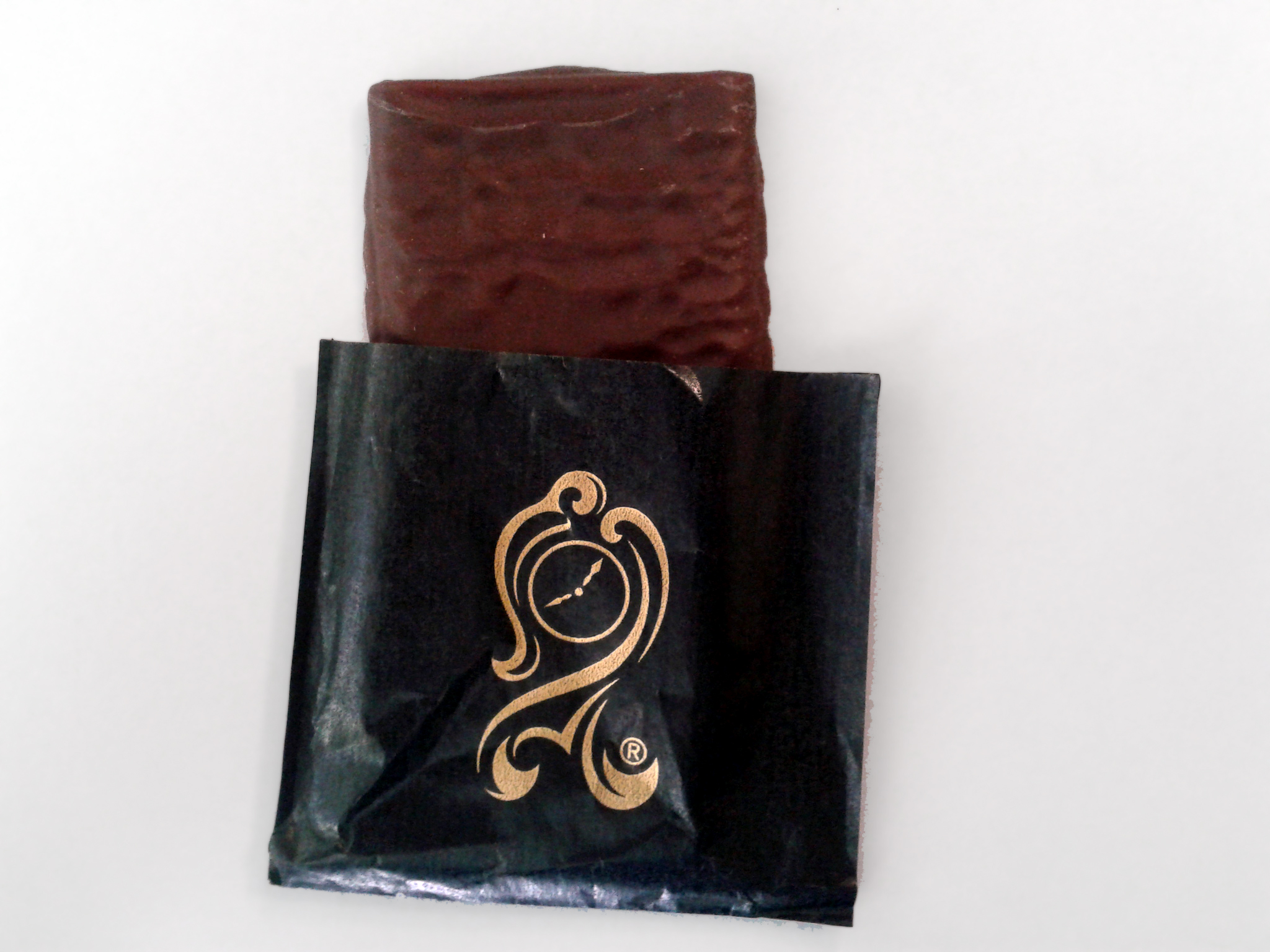 After Eight die feine englische Art